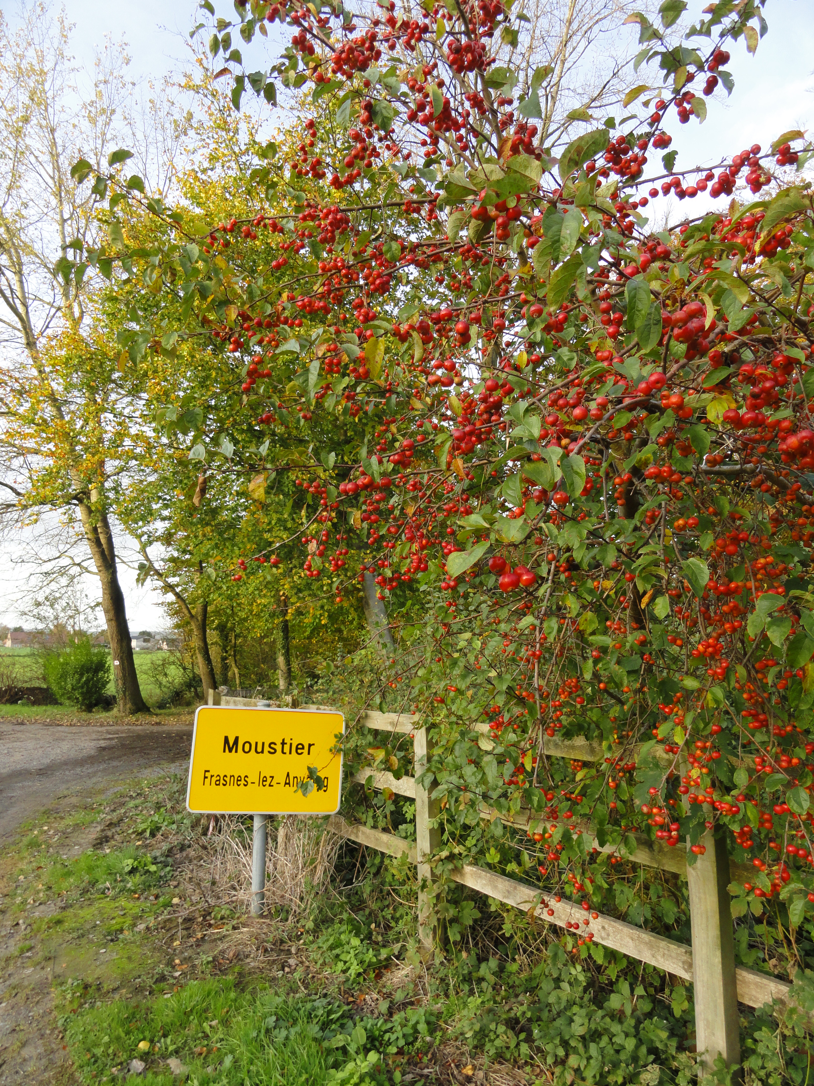 Panneau communal, Moustier (drève)